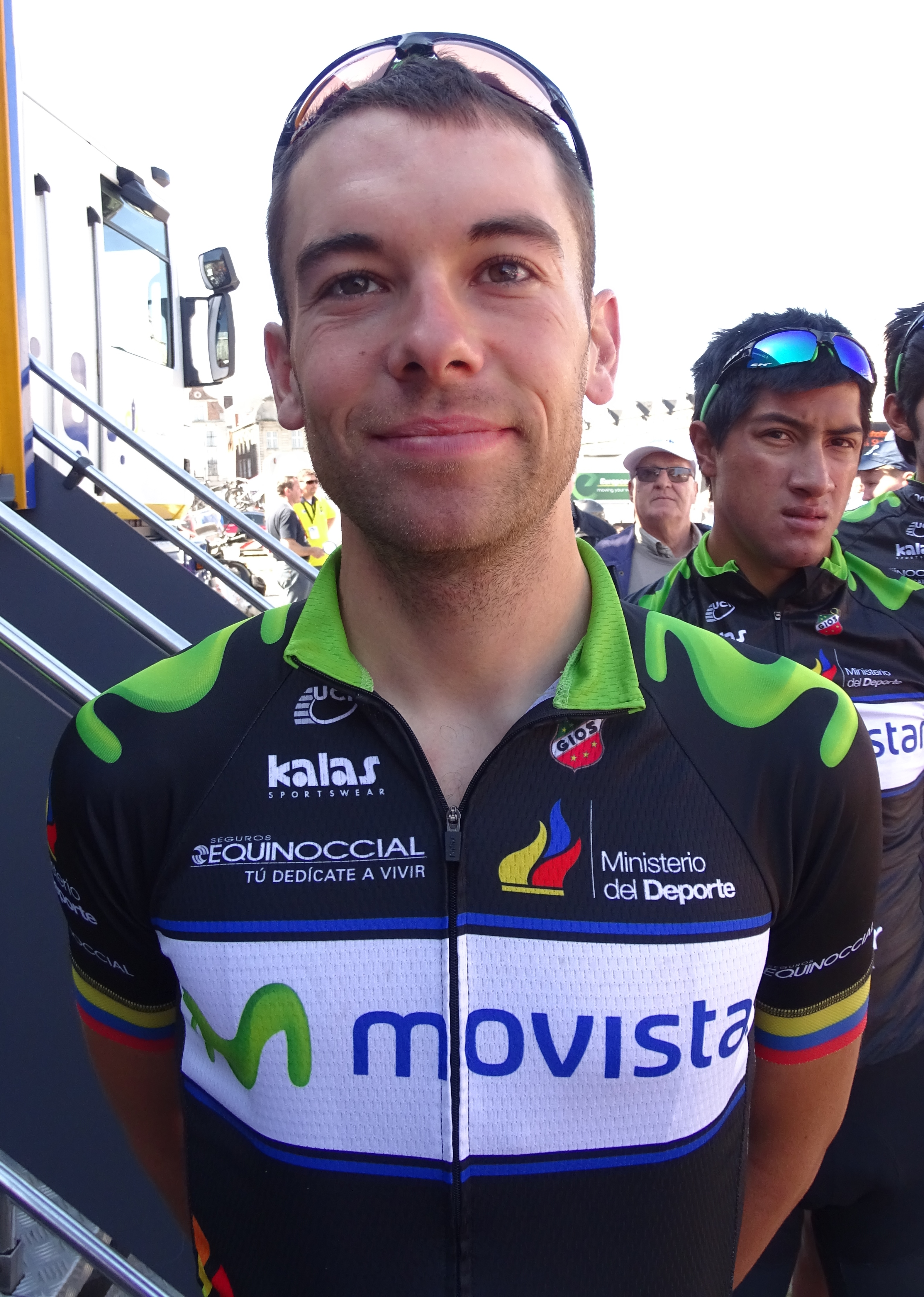 Reportage réalisé le dimanche 24 mai 2015 à l'occasion du départ et de l'arrivée de la troisième étape du Paris-Arras Tour 2015 à Arras, Pas-de-Calais, Nord-Pas-de-Calais, France. Depicted person: Higinio Fernández Depicted team: Ecuador